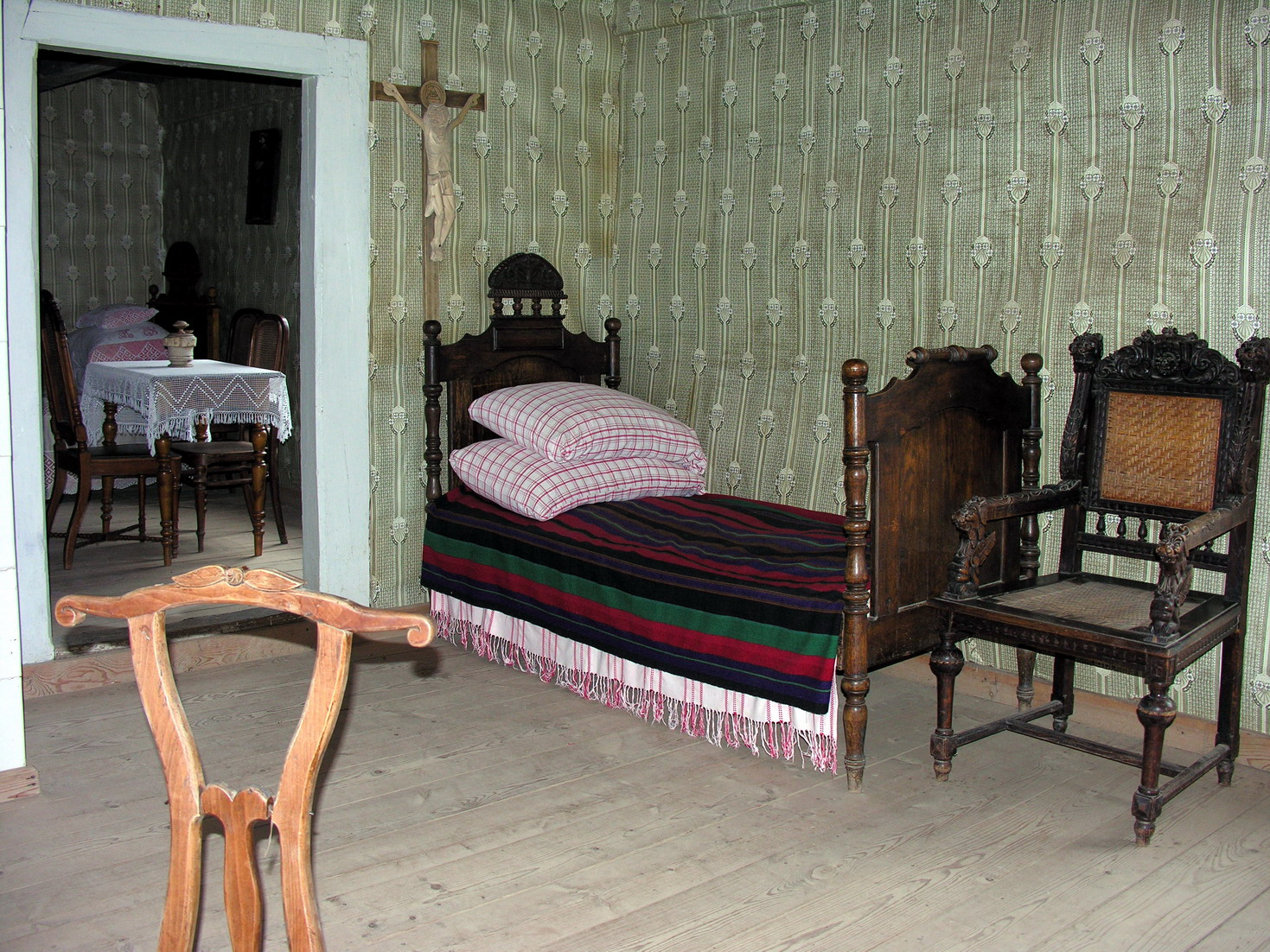 Žemaičių trobos vidus 2007 m. balandžio 21 d., Lietuva